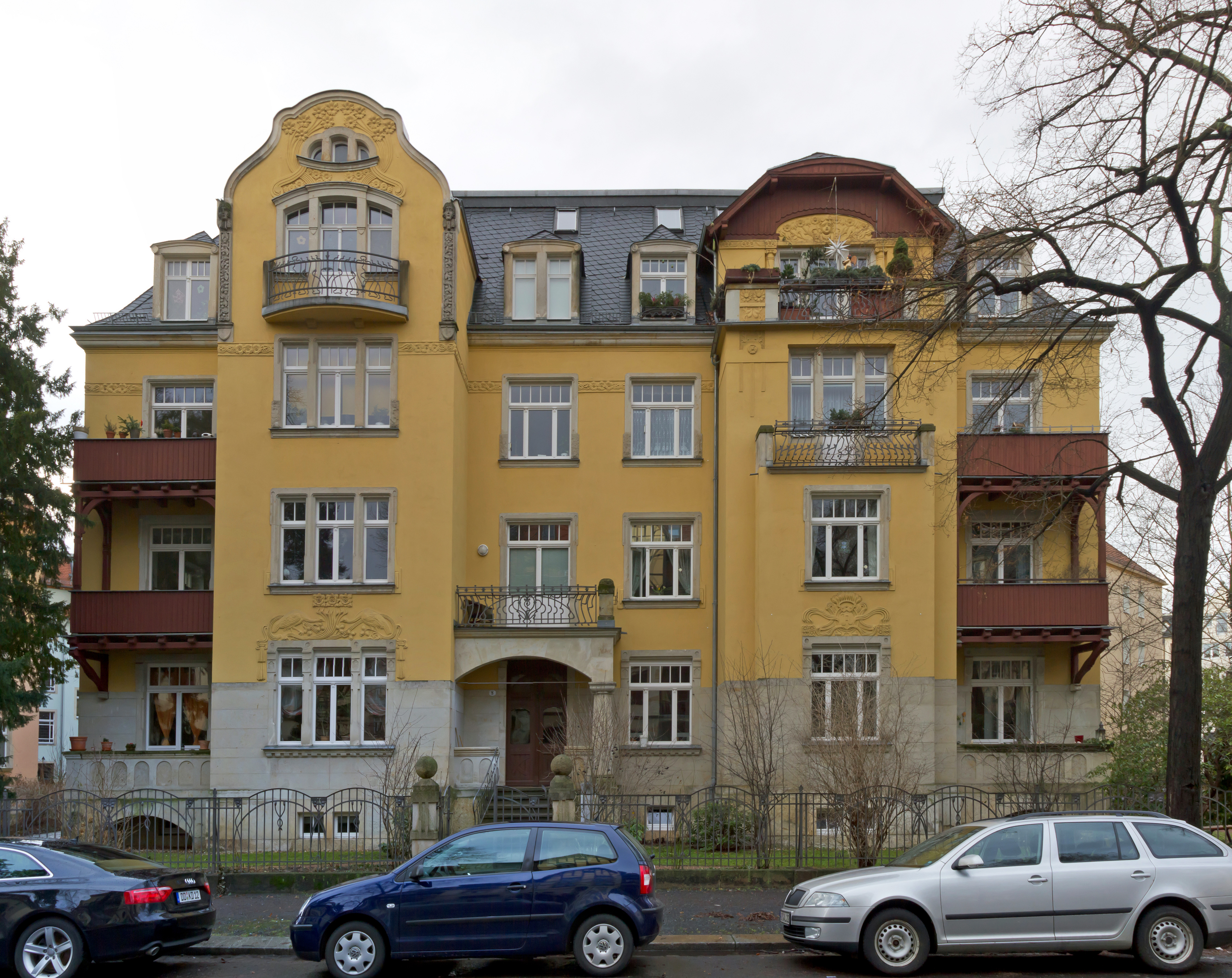 Reinickstraße 8 Dresden